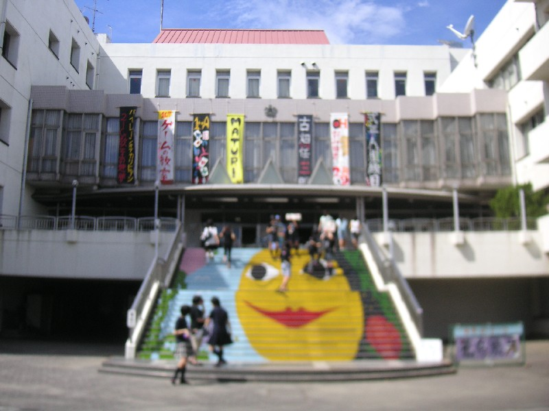 2007年度富士校祭の様子.